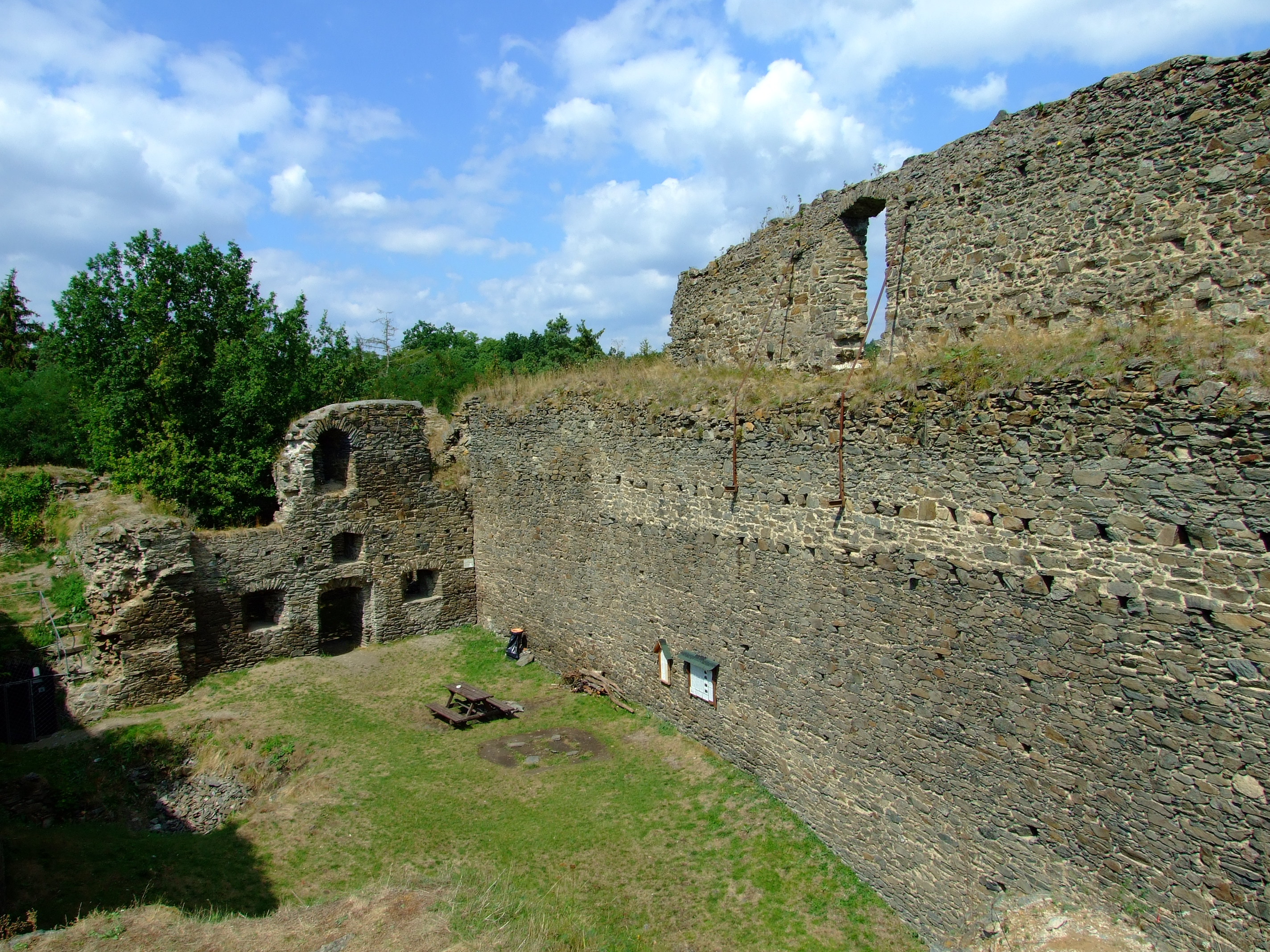 Hrad Buben